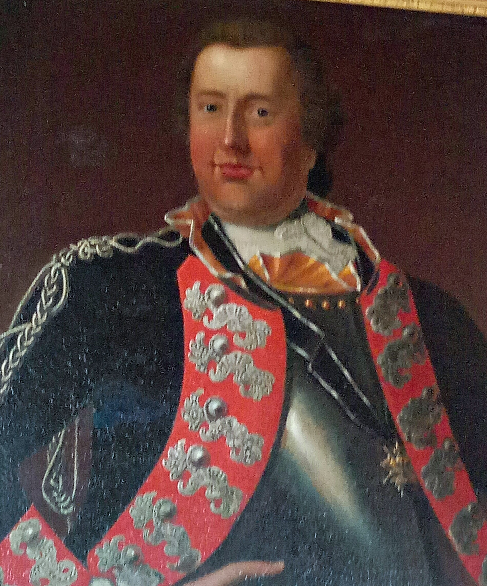 Graf Georg Carl I. August Ludwig von Leiningen-Westerburg-Neuleiningen (1717-1787), zeitgenössisches Porträt im Museum im Alten Rathaus Grünstadt.